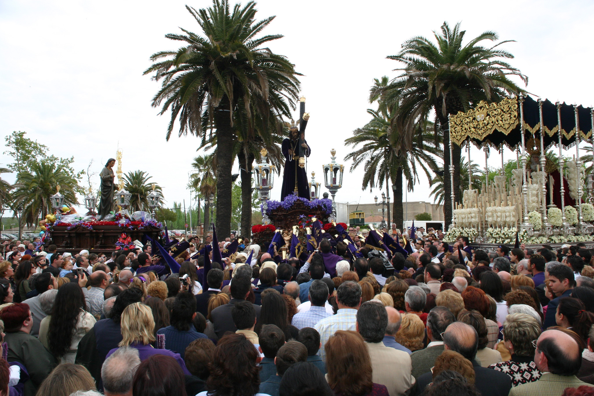 Bendición de nuestro señor del Nazareno en el paseo de Linarejos, junto al monumento a Andrés Segovia.